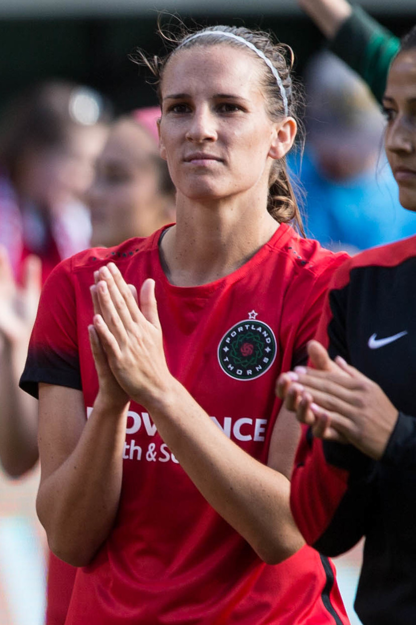 N42A3220.jpg